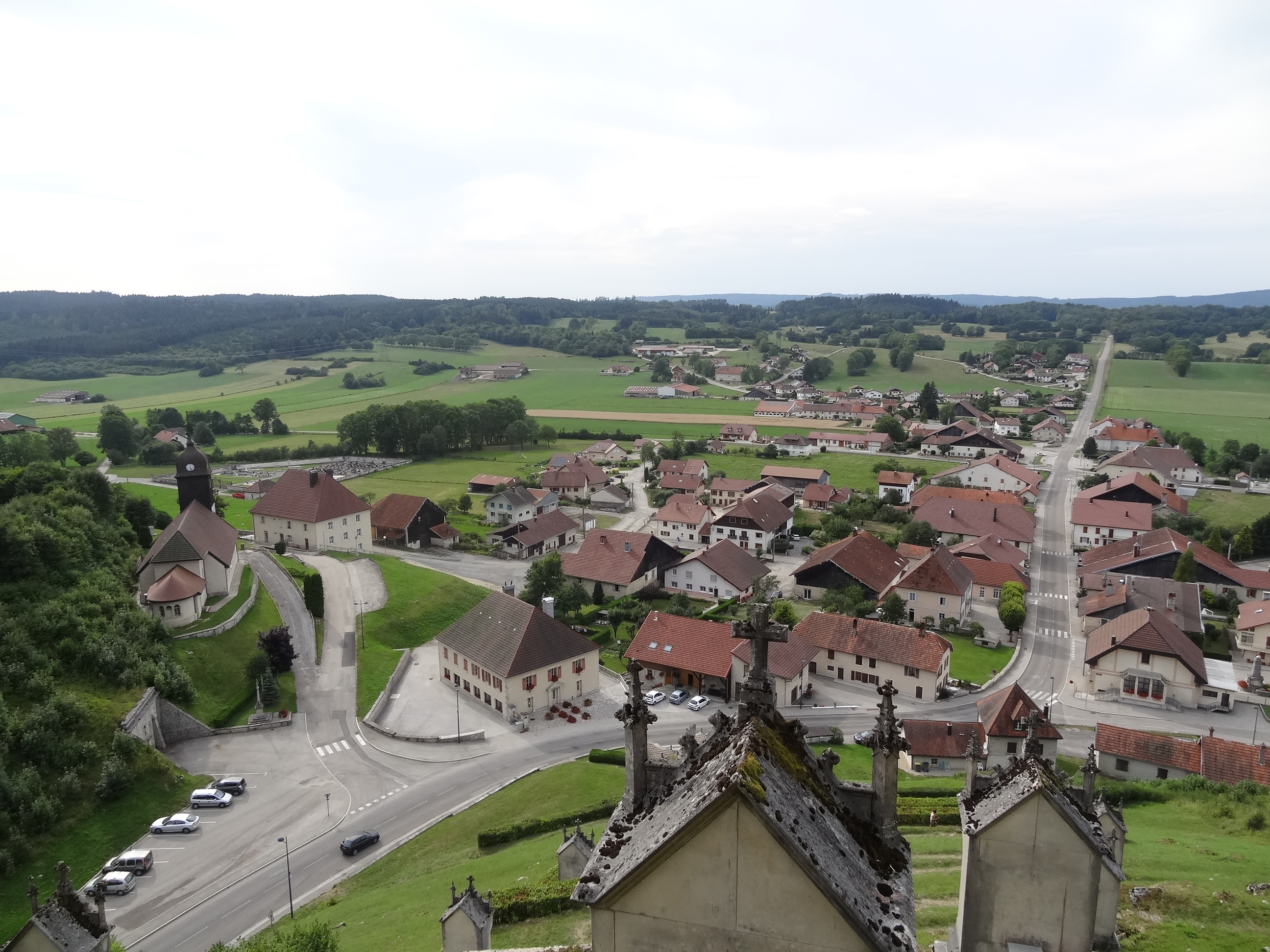 Sombacour (Doubs) - vue générale du haut du Mont-calvaire